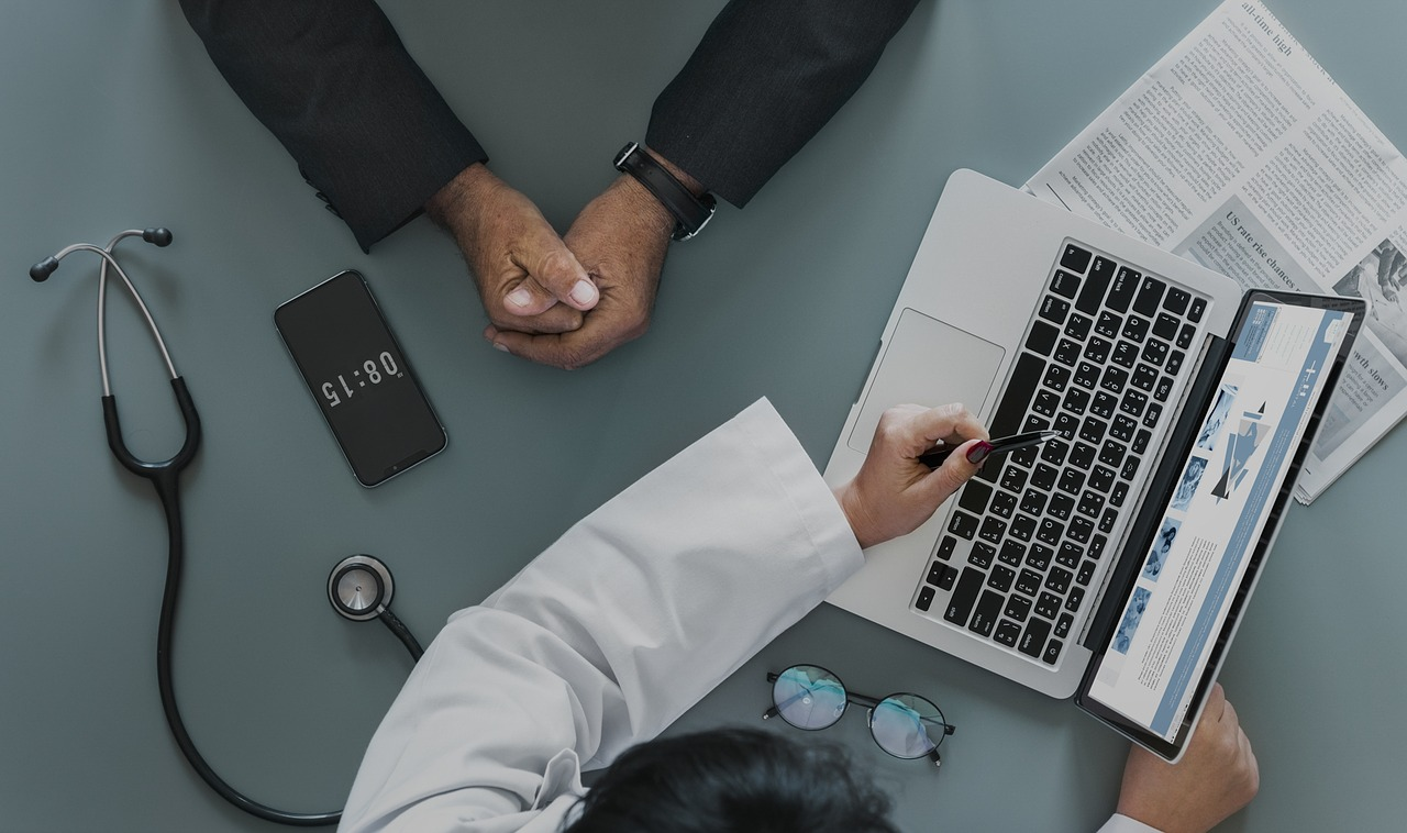 Posavjetujte se s liječnikom o preparatima koji će obnoviti vašu kožnu barijeru i spriječiti ulazak alergena.